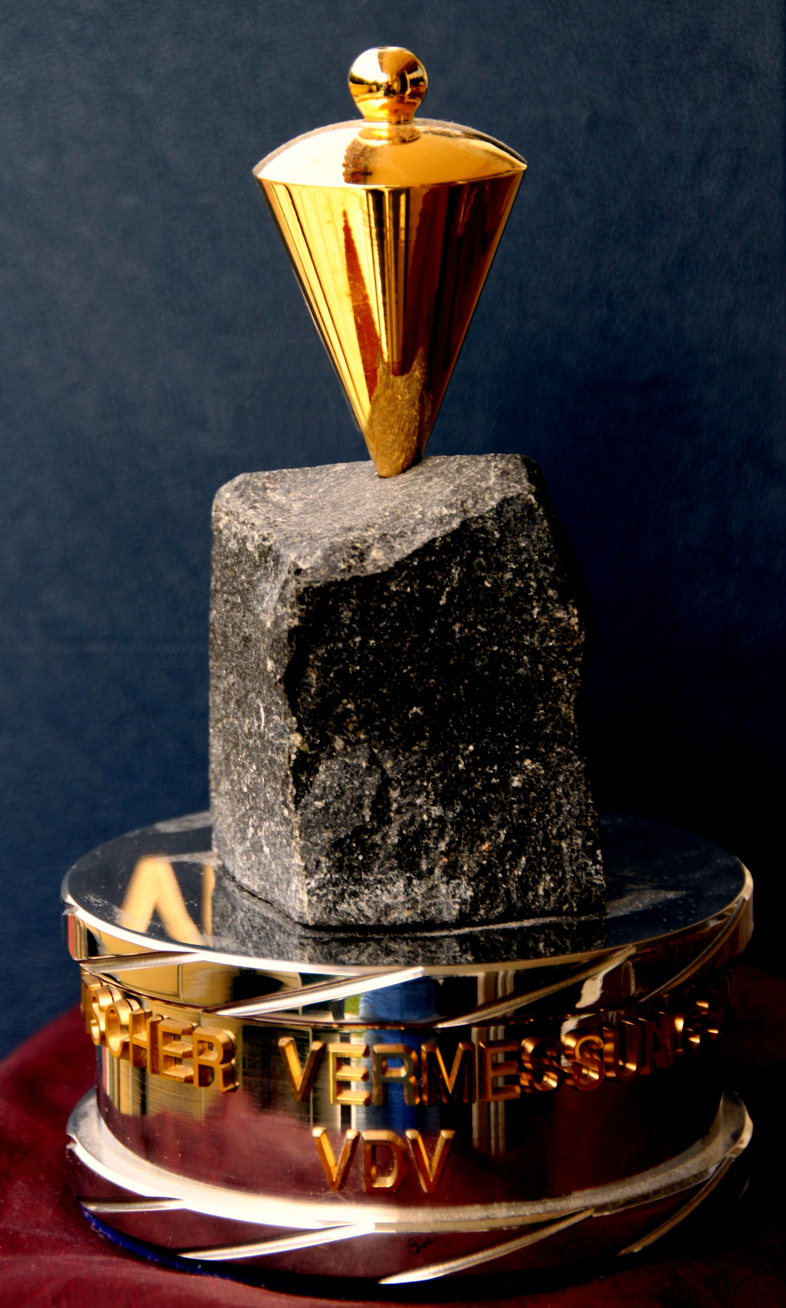 Das Goldene Lot. Auszeichnung des Verbandes Deutscher Vermessungsingenieure (VDV) e.V.